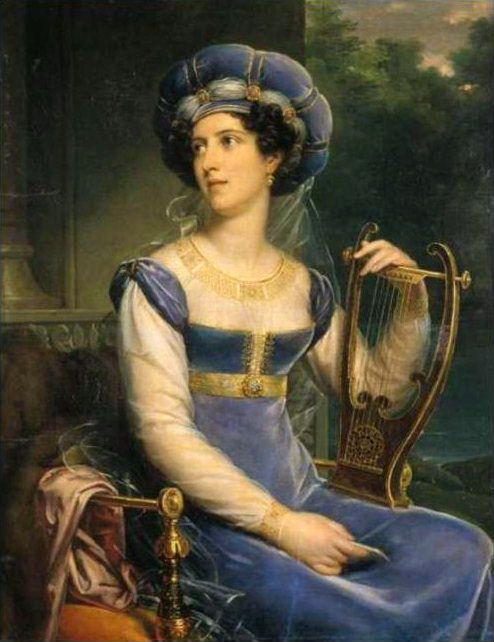 Графиня Марина Дмитриевна Гурьева (1798-1871), дочь Д.Л.Нарышкина и М.А.Четвертинской, фаворитки Александра I, с 1819 года жена графа Николая Дмитриевича Гурьева (1792-1849).